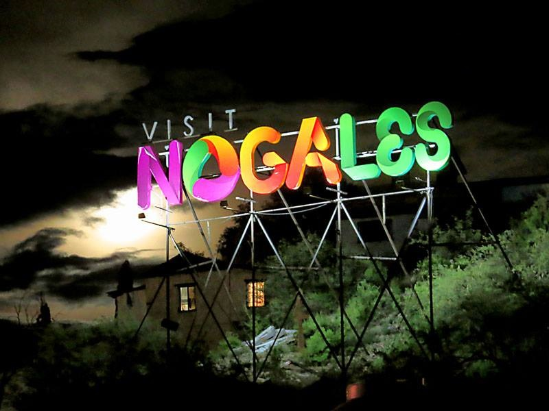 Campaña publicitaria de Nogales